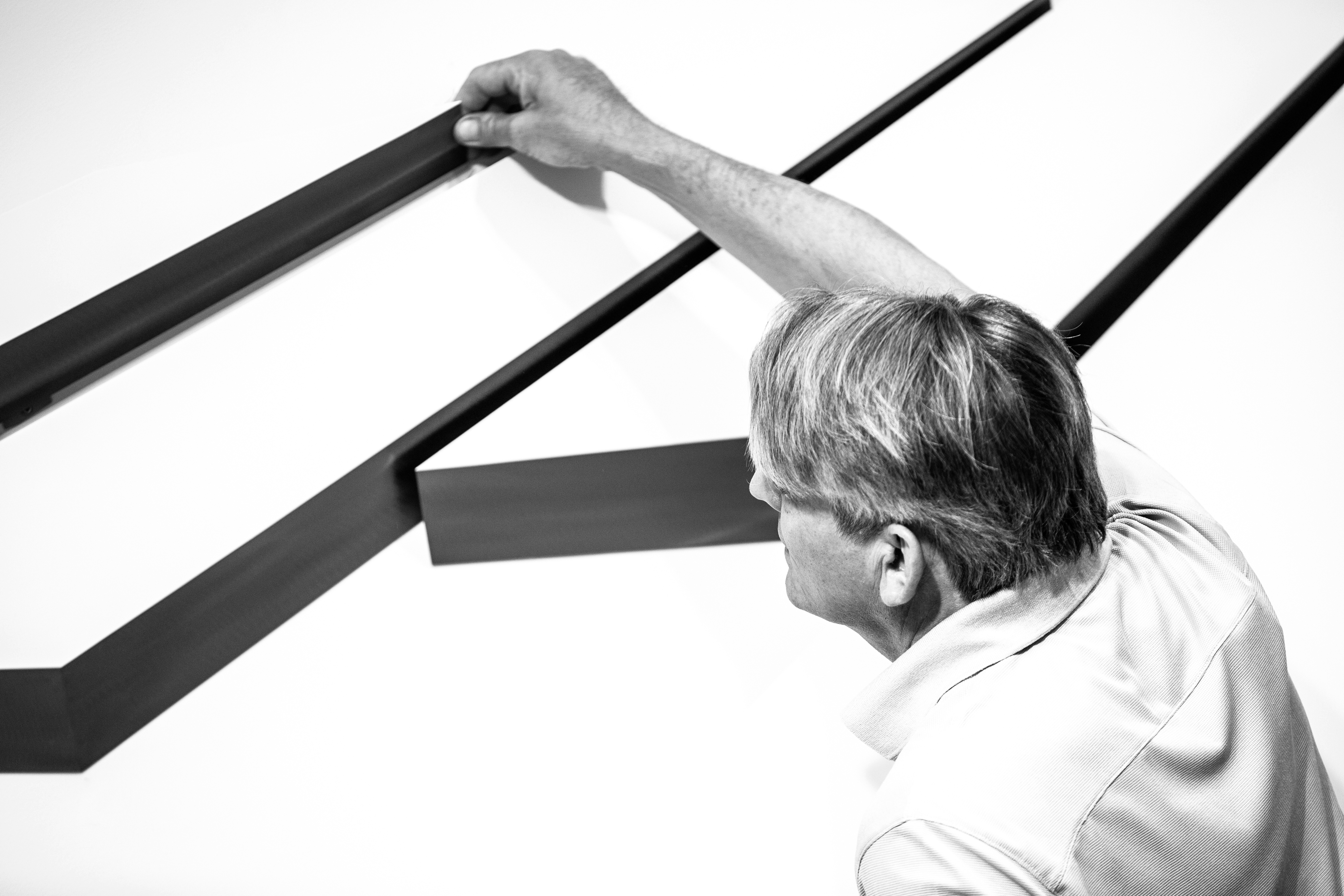 Copyright: Fabio Mantegna